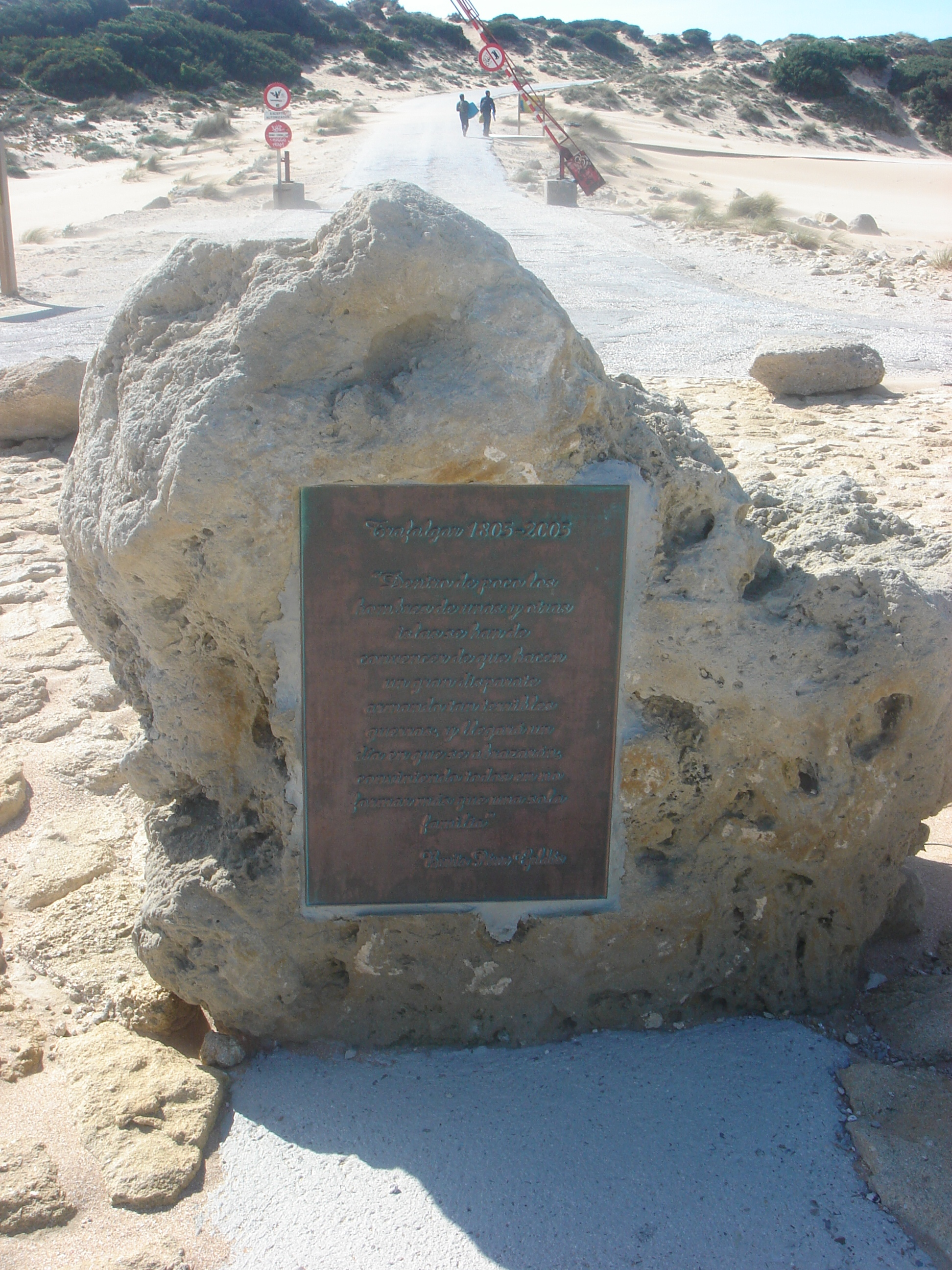 Conmemoración del 200 aniversario de la Batalla de Trafalgar. Escrito de Benito Pérez Galdós